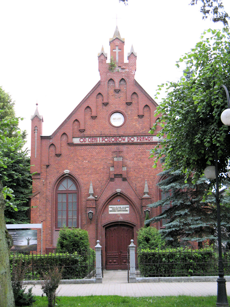 Kościół w Ełku przy ulicy 3 Maja